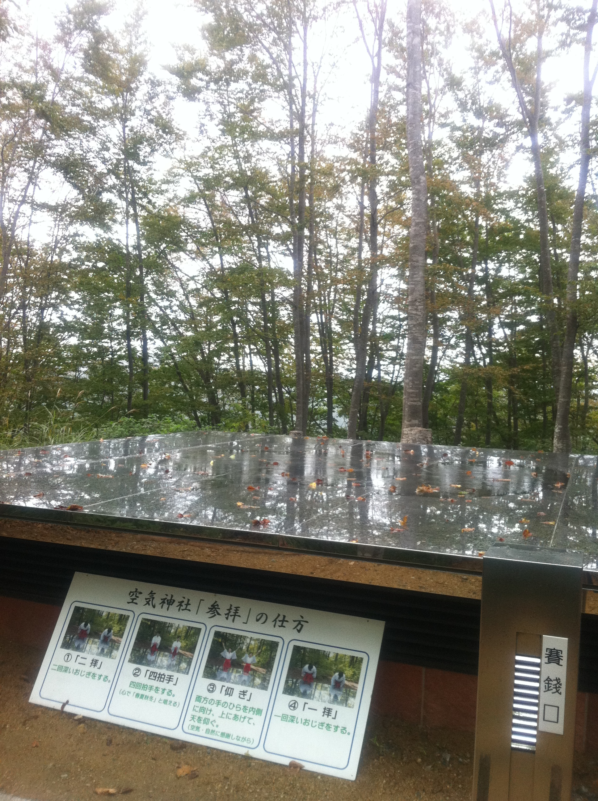 参拝の仕方